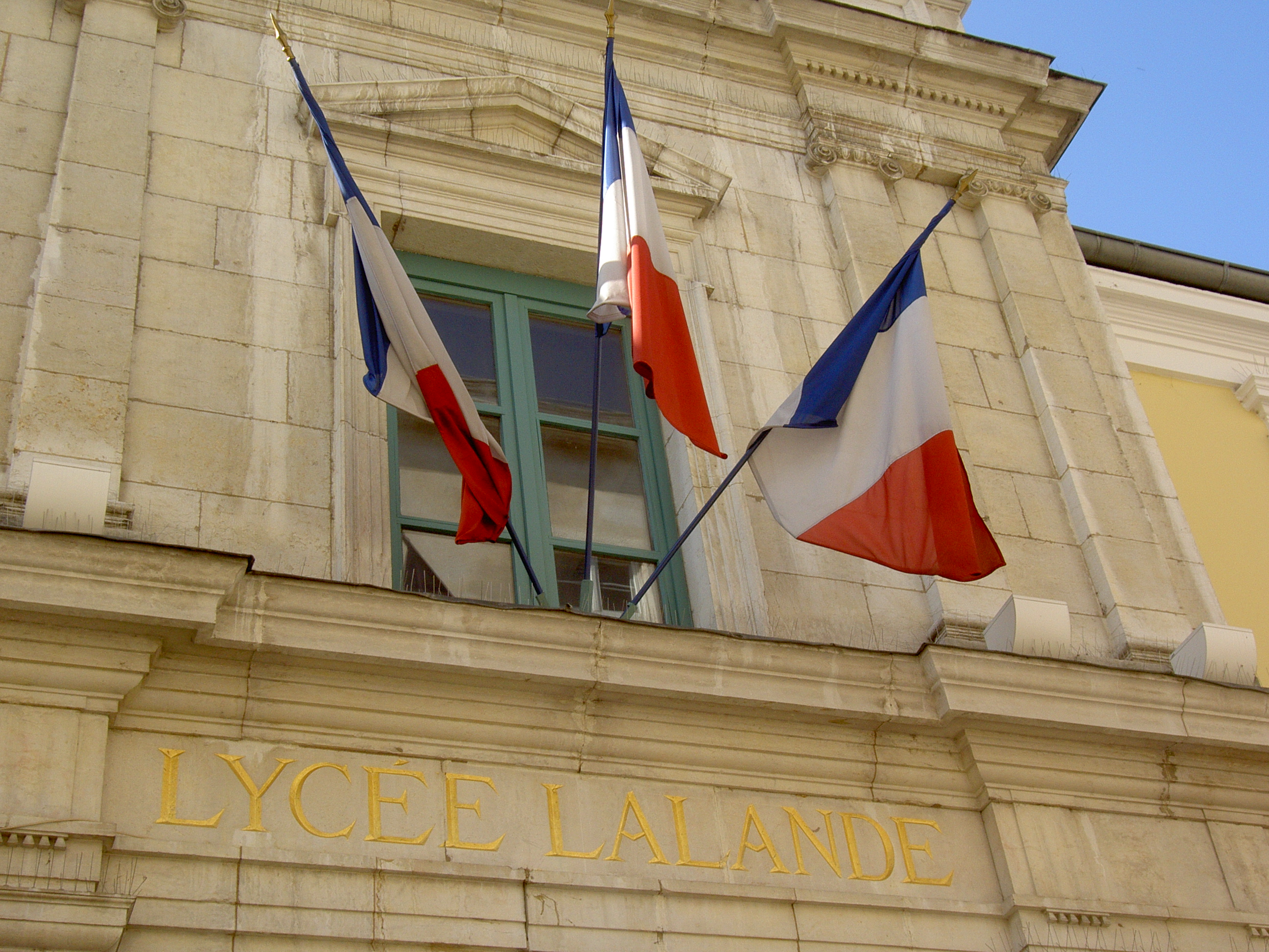 lycée Lalande à Bourg-en-Bresse, France